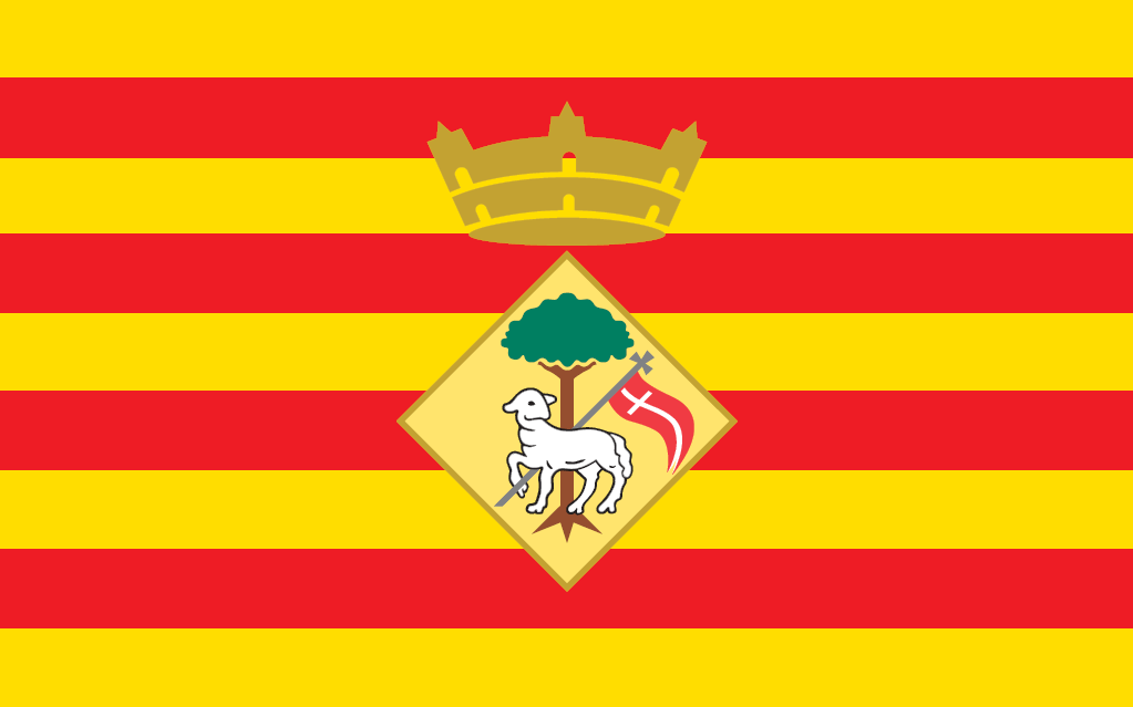 Bandera del municipio